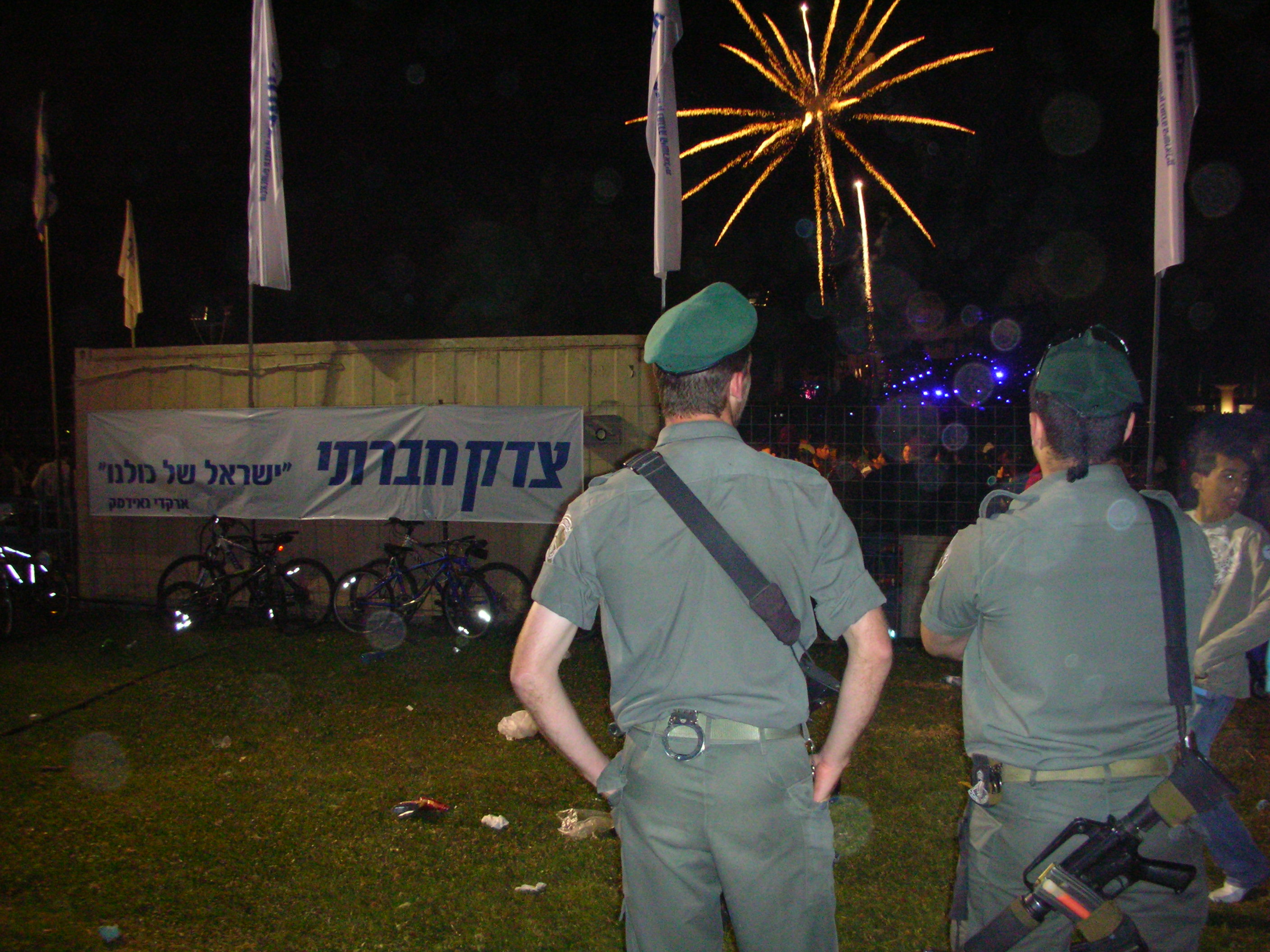 זיקוקים תוצרת הארץ.